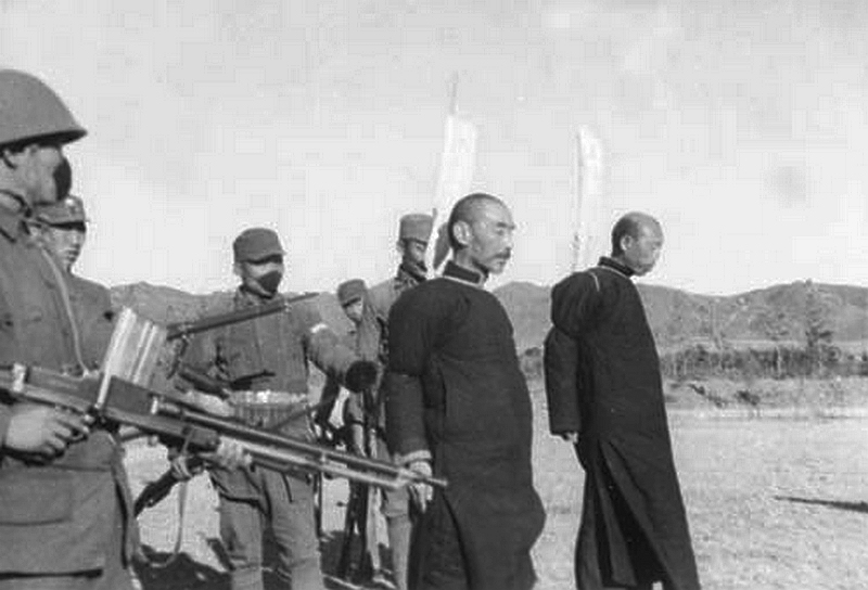 1945年10月，大汉奸张家口市伪市长韩广森、伪副市长崔景岚被枪毙。